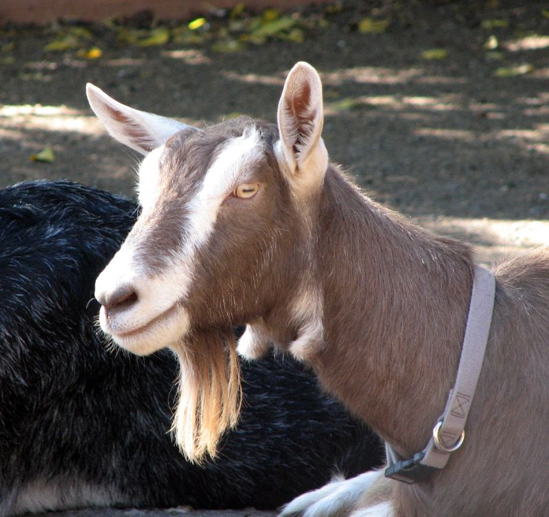 A Toggenburg dairy goat.